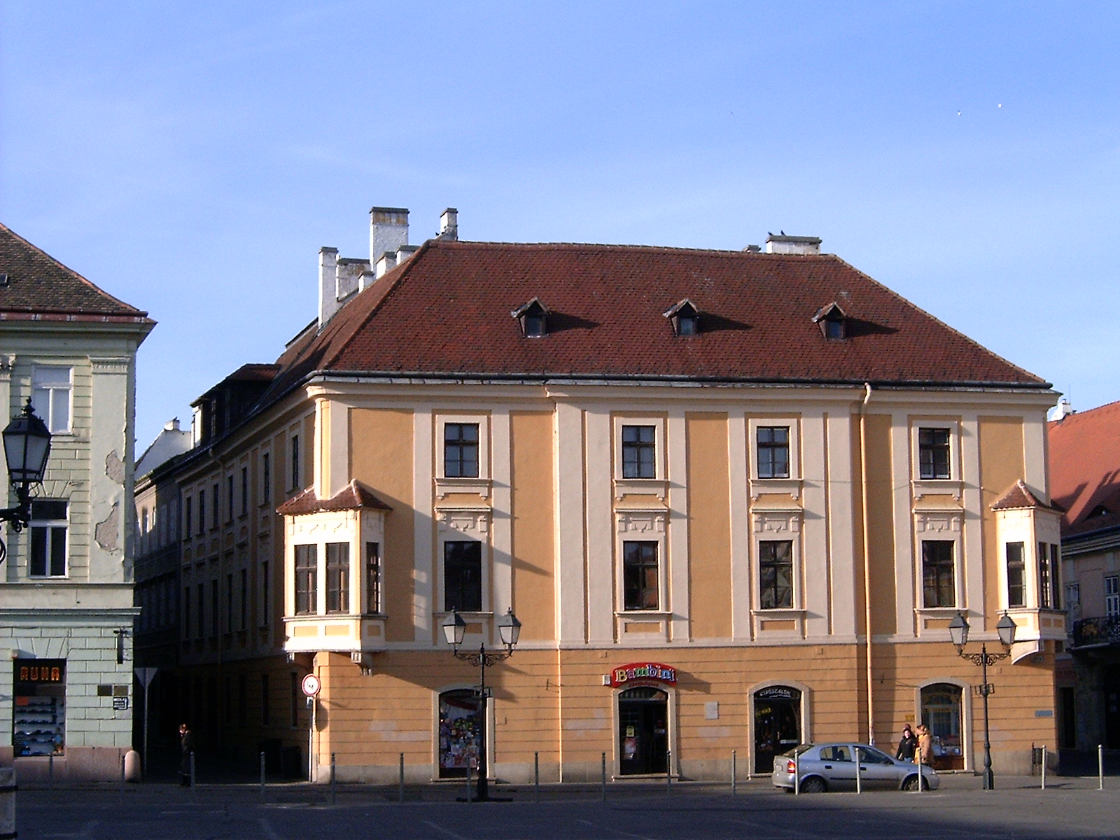 Két sarokerkélyes copf lakóház Győrött a Széchenyi téren (Győr-Moson-Sopron megye)